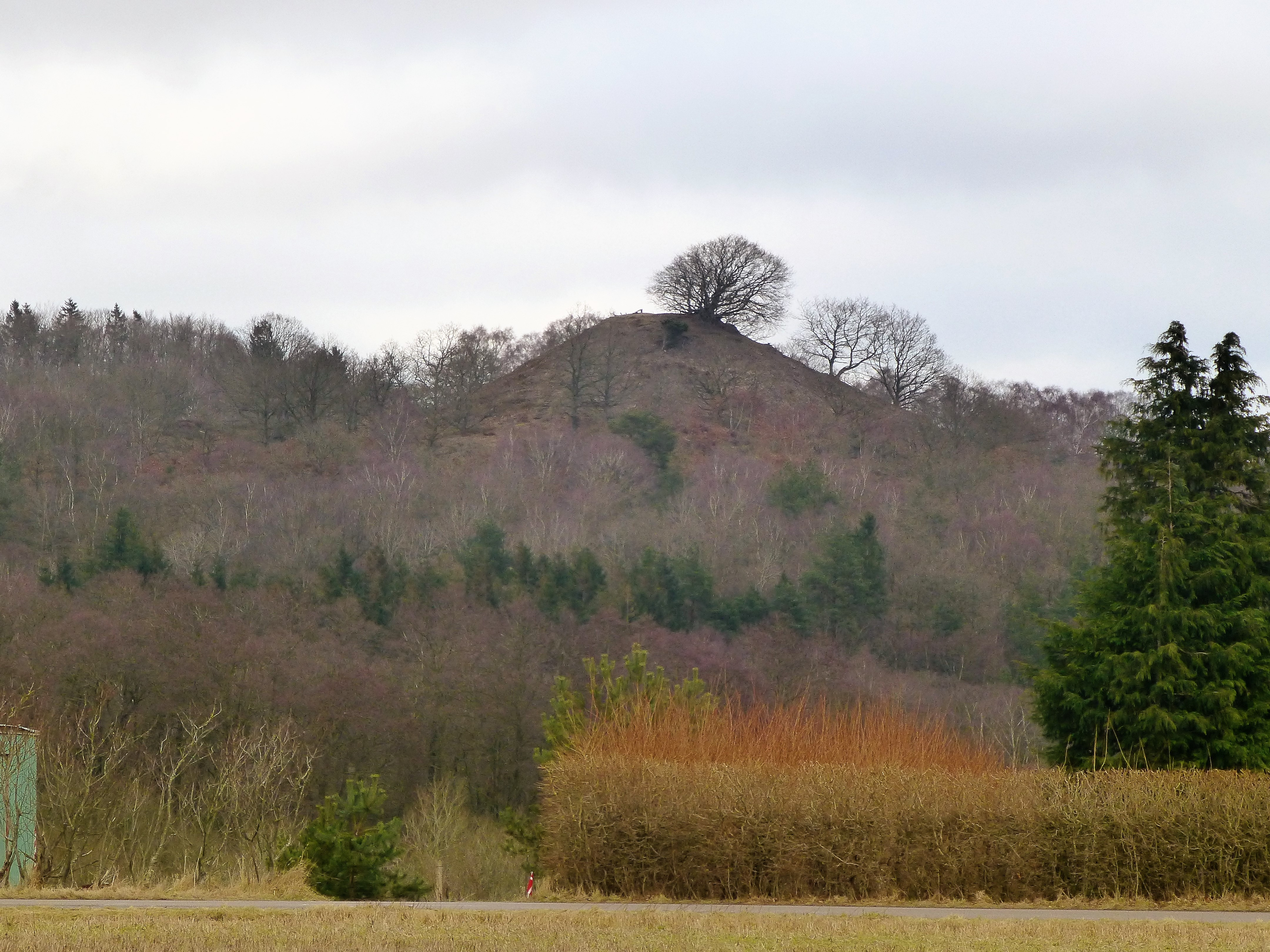 Troldhøj set mod nordøst, fra fra Sminge